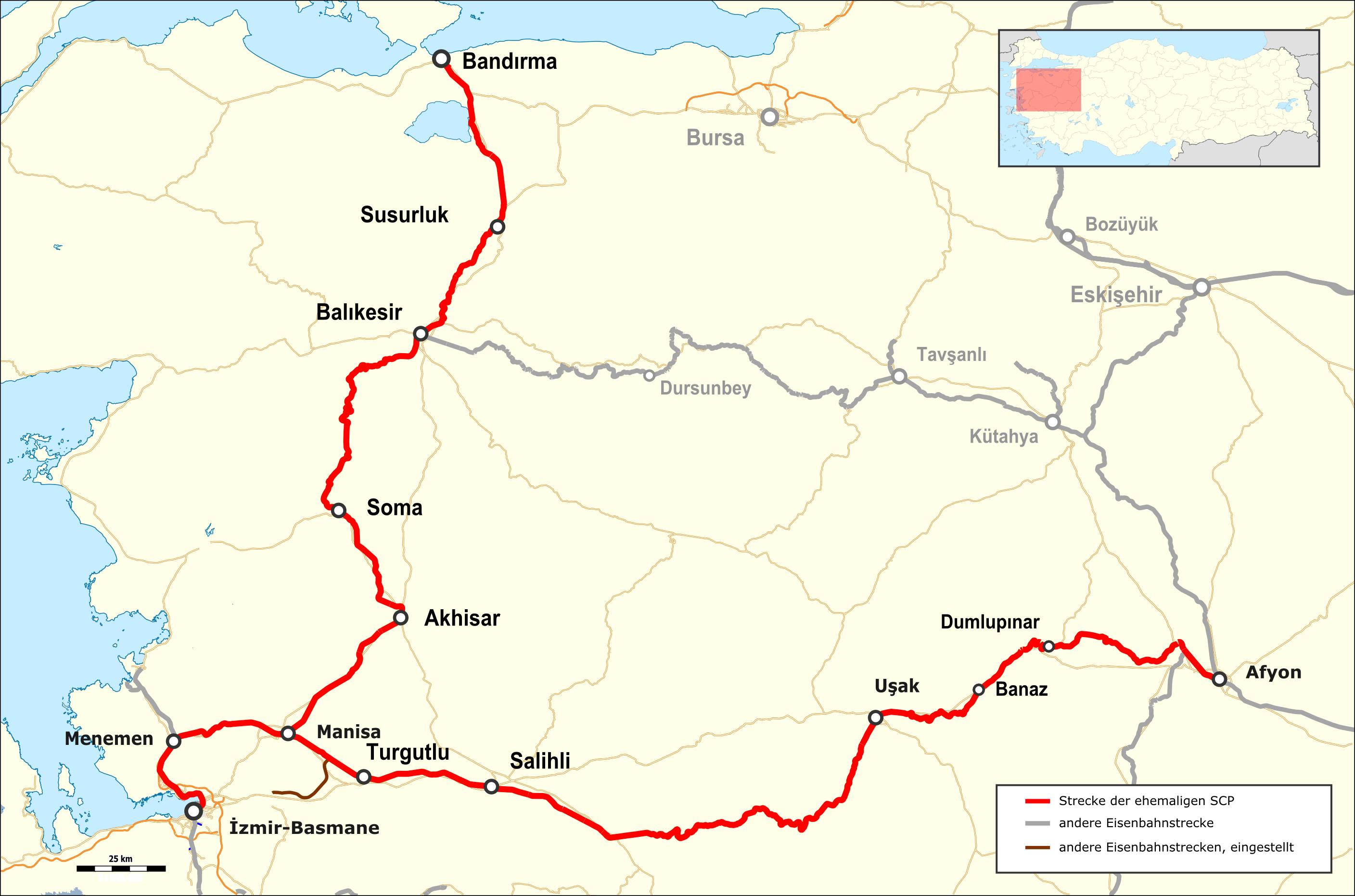 Karte der Chemin de fer de Smyrne-Cassaba et Prolongements im Zustand von 2015